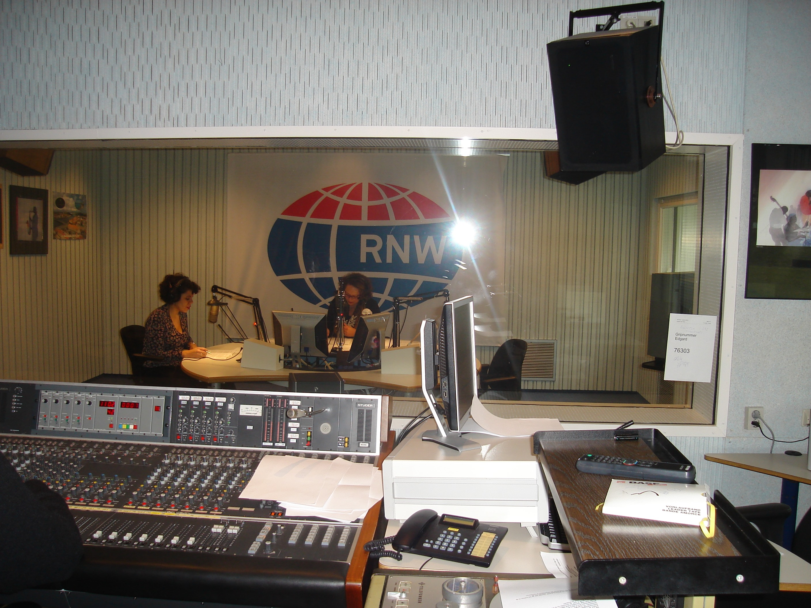 Radio Nederland Wereldomroep Studio أستديو إذاعة هولندا العالمية